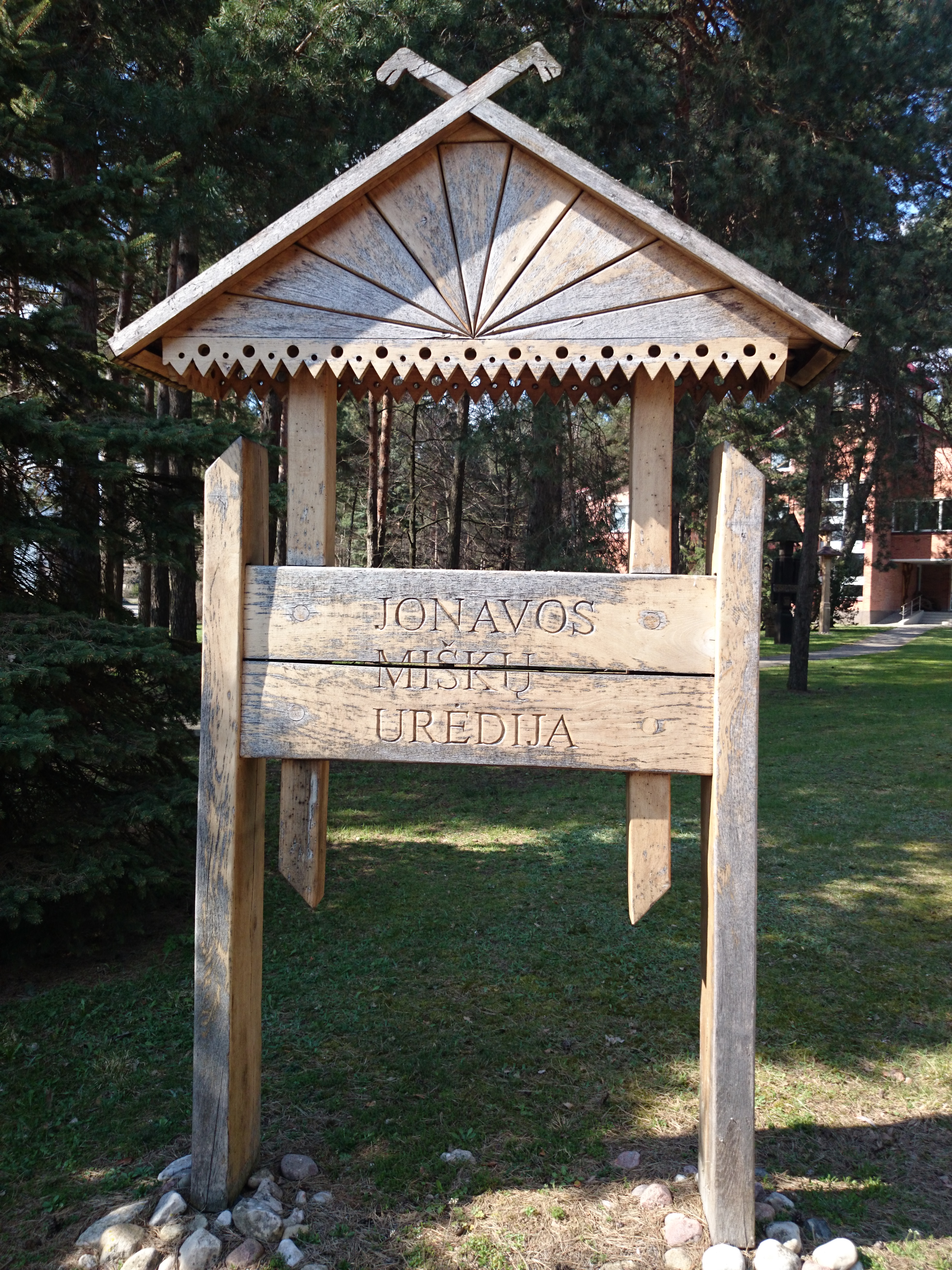 Jonava Forestry